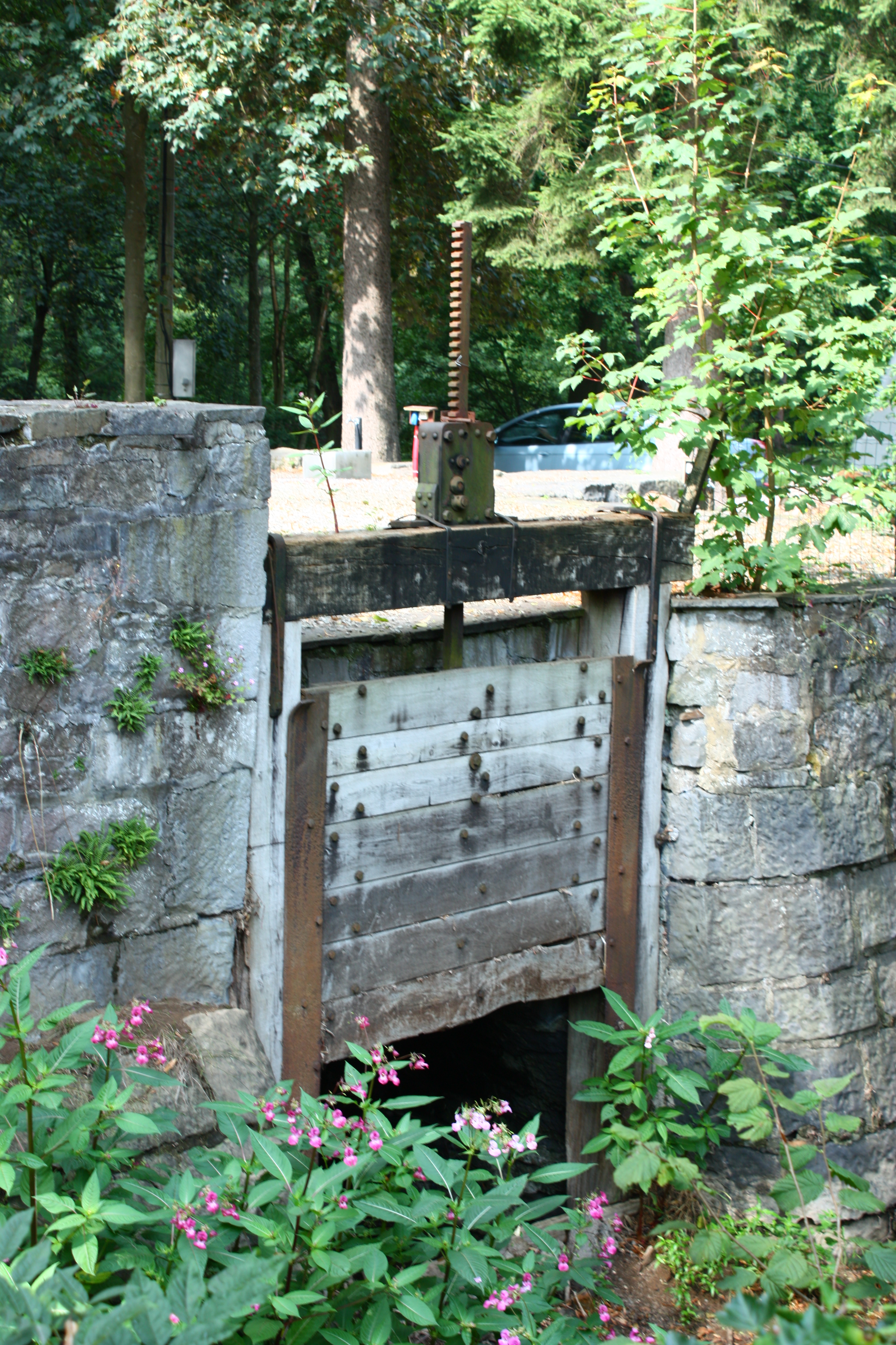 Vanne de dérivation d'eau, Château de Dieupart, route de Remouchamp à Aywaille.